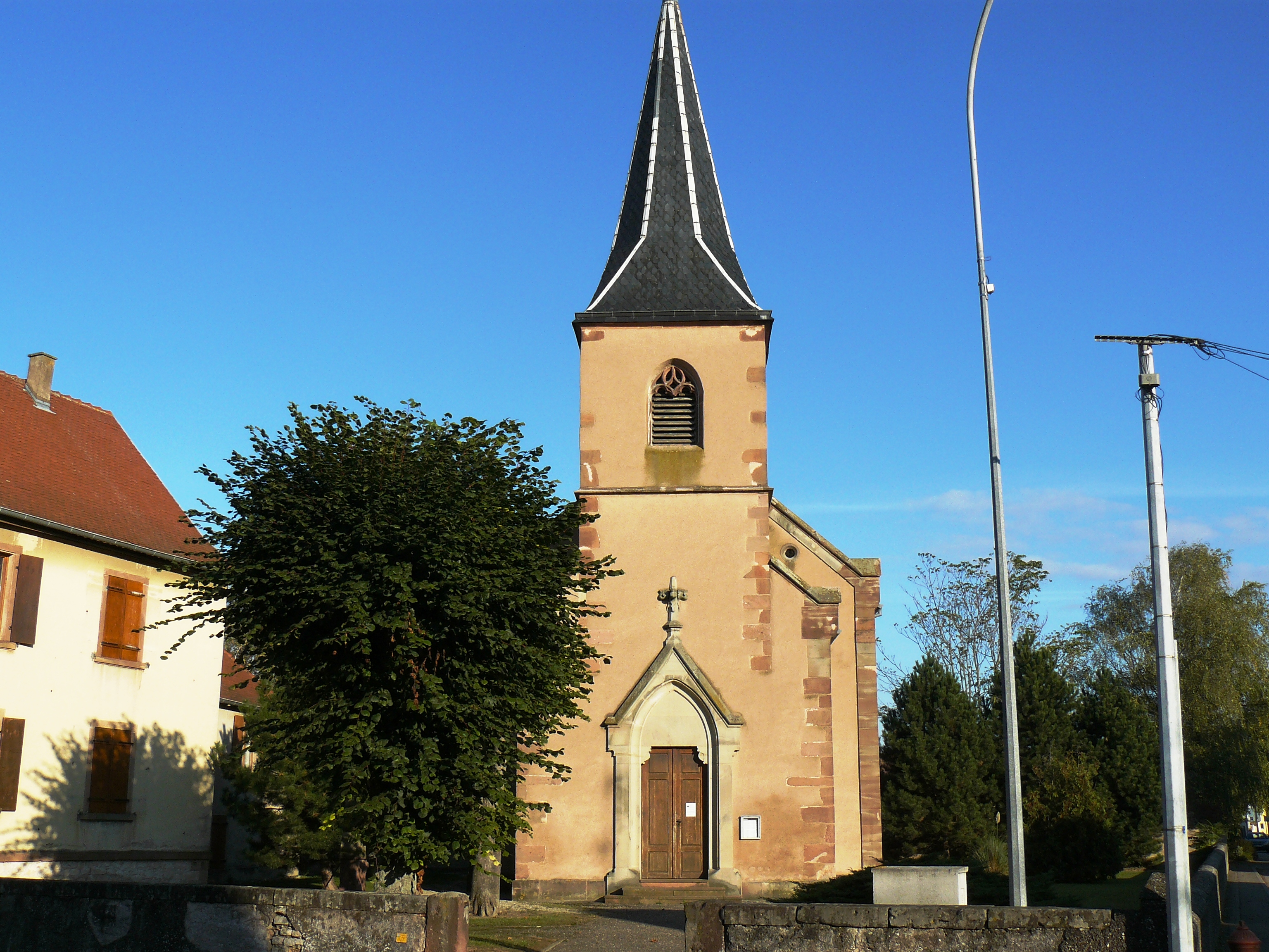 Église Saint-Étienne (catholique) de Boofzheim